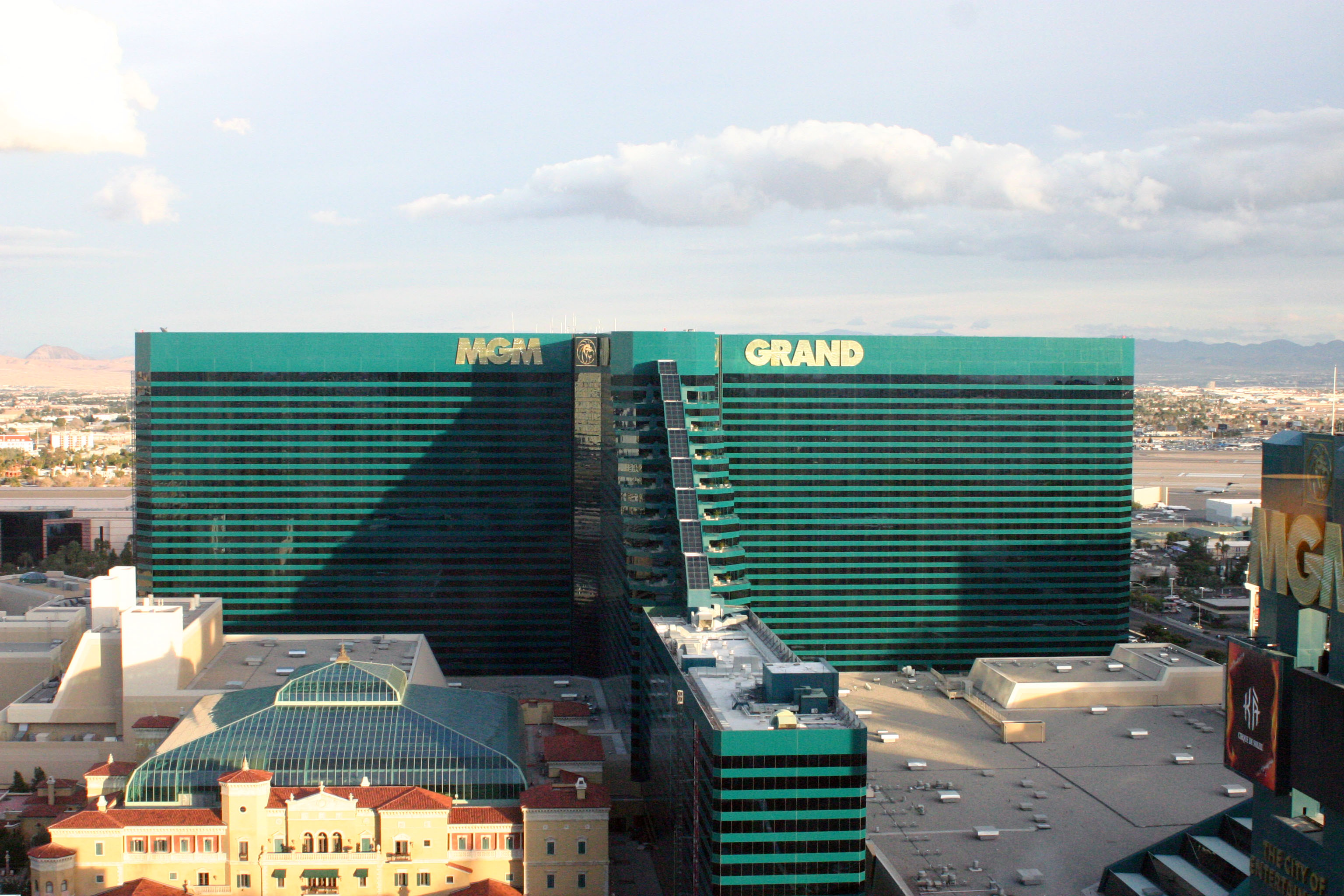 MGM Grand Hotel, Las Vegas, Nevada, USA